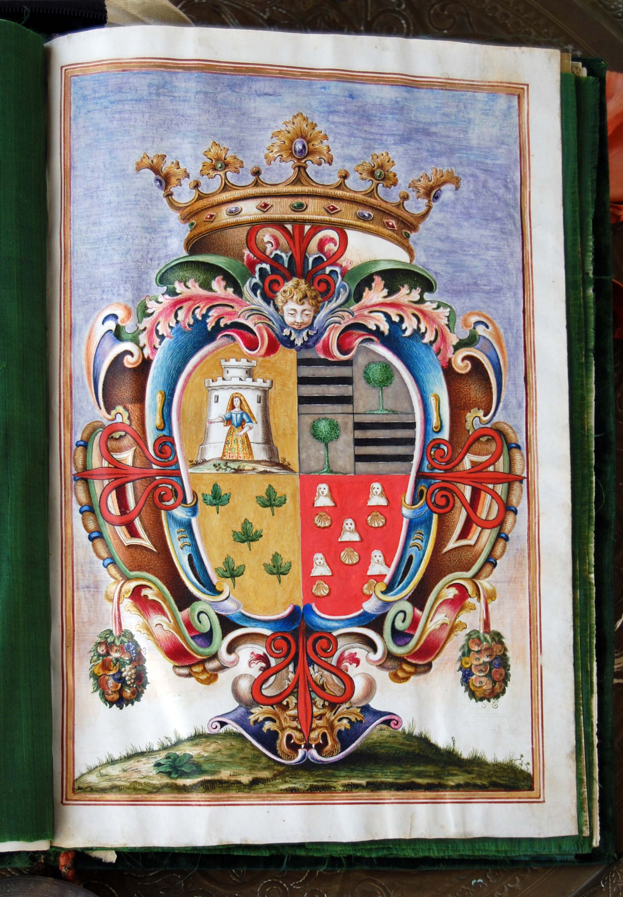 Armas de Diego Pablo de Mora y Figueroa, primer Marqués de Tamarón, ejecutoria, 1712.